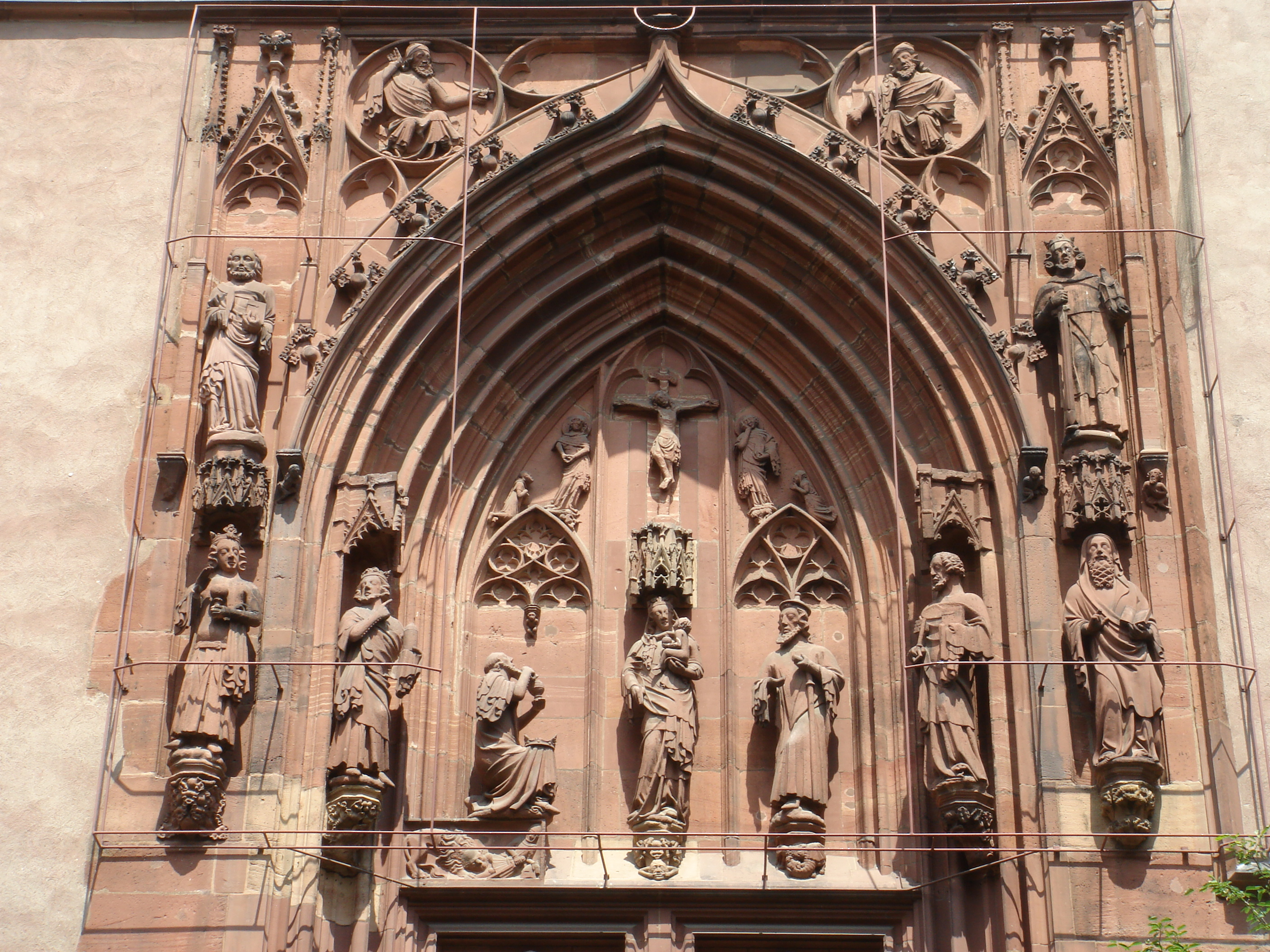 Kaiserdom St. Bartholomäus, Südportal, Nahaufnahme